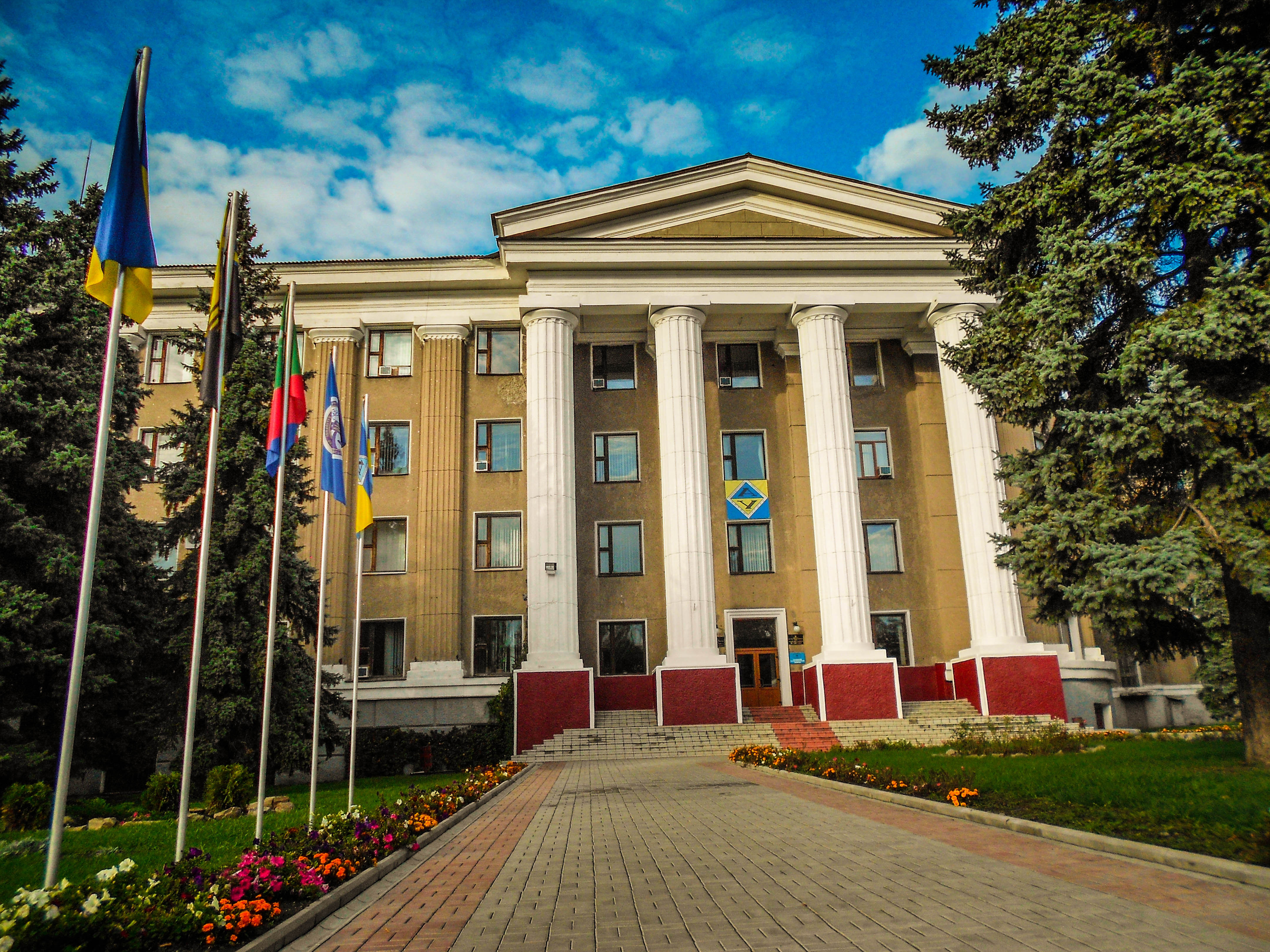 Адміністративний будинок виробничого об'єднання "Артемвугілля", Горлівка, пр.Леніна.13